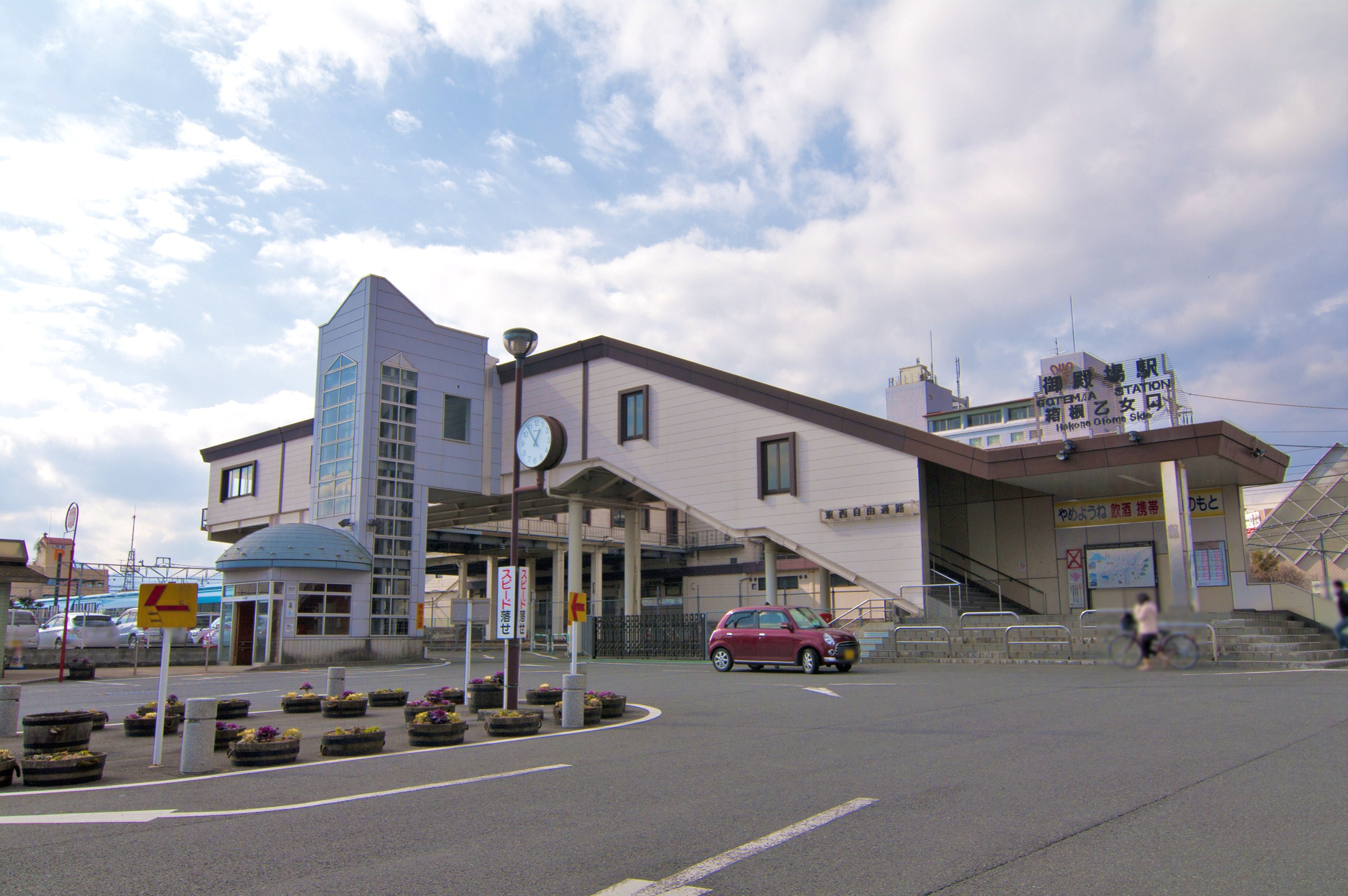 東海旅客鉄道株式会社 御殿場線 御殿場駅